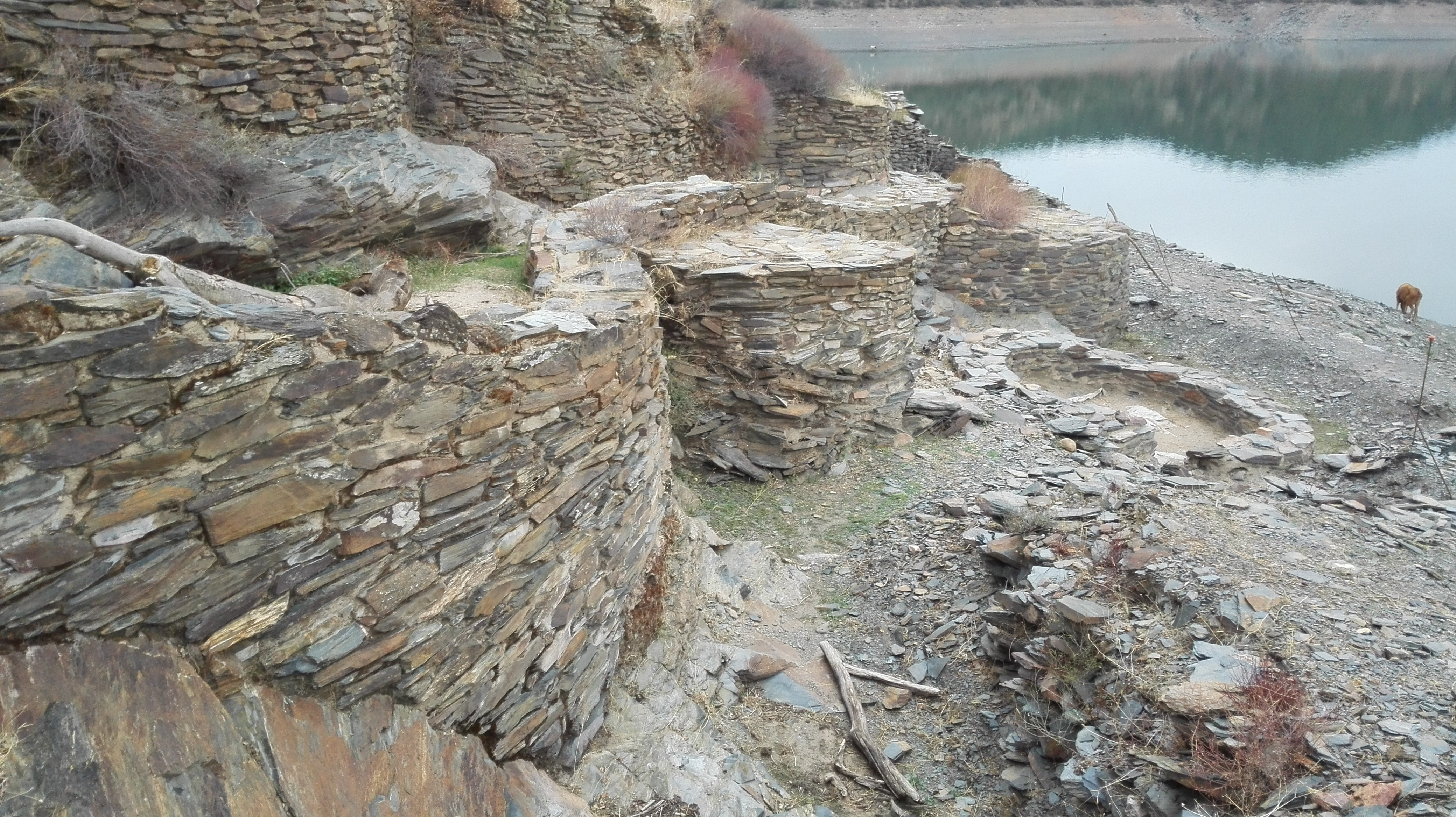 Vista general del yacimiento de Peñalosa